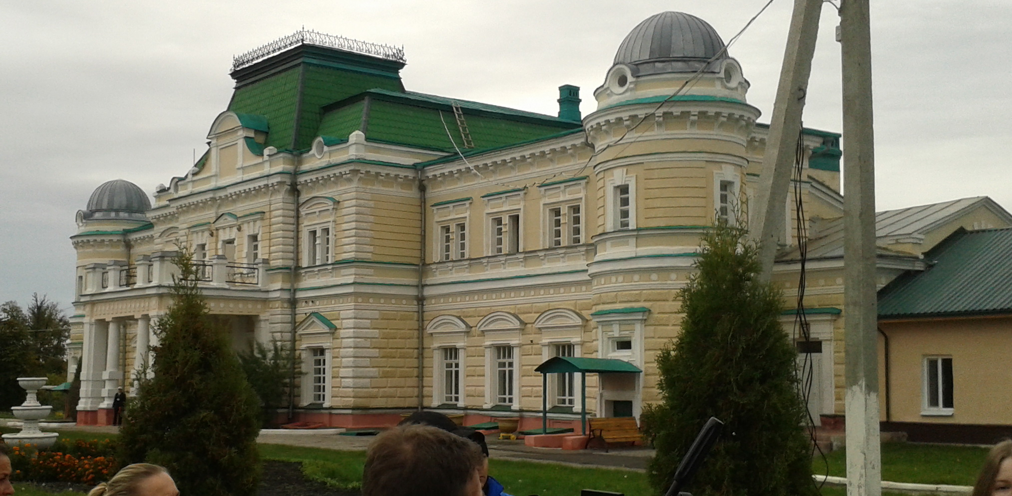 Усадьба Устиновых в с. Грабово Бессоновского района Пензенской области